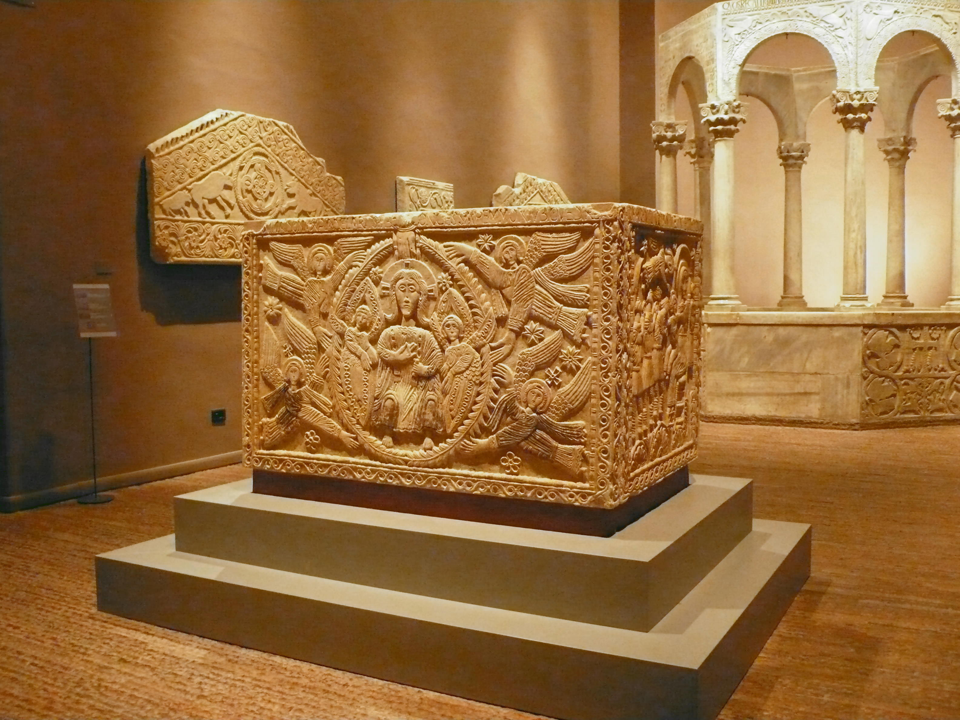 Cividale del Friuli, Museo Cristiano, Ratchis-Altar